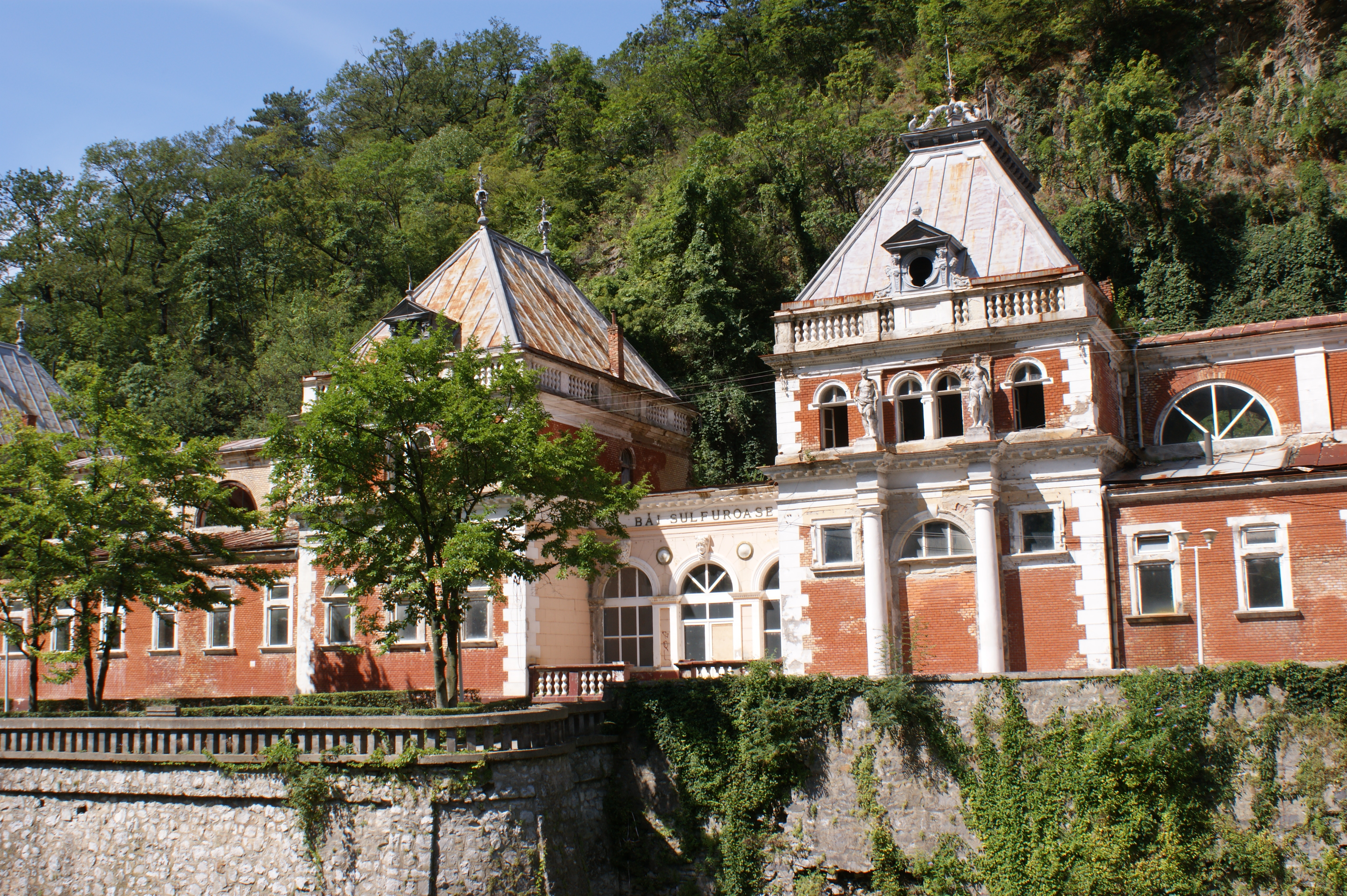 Ansamblul de arhitectură balneară II